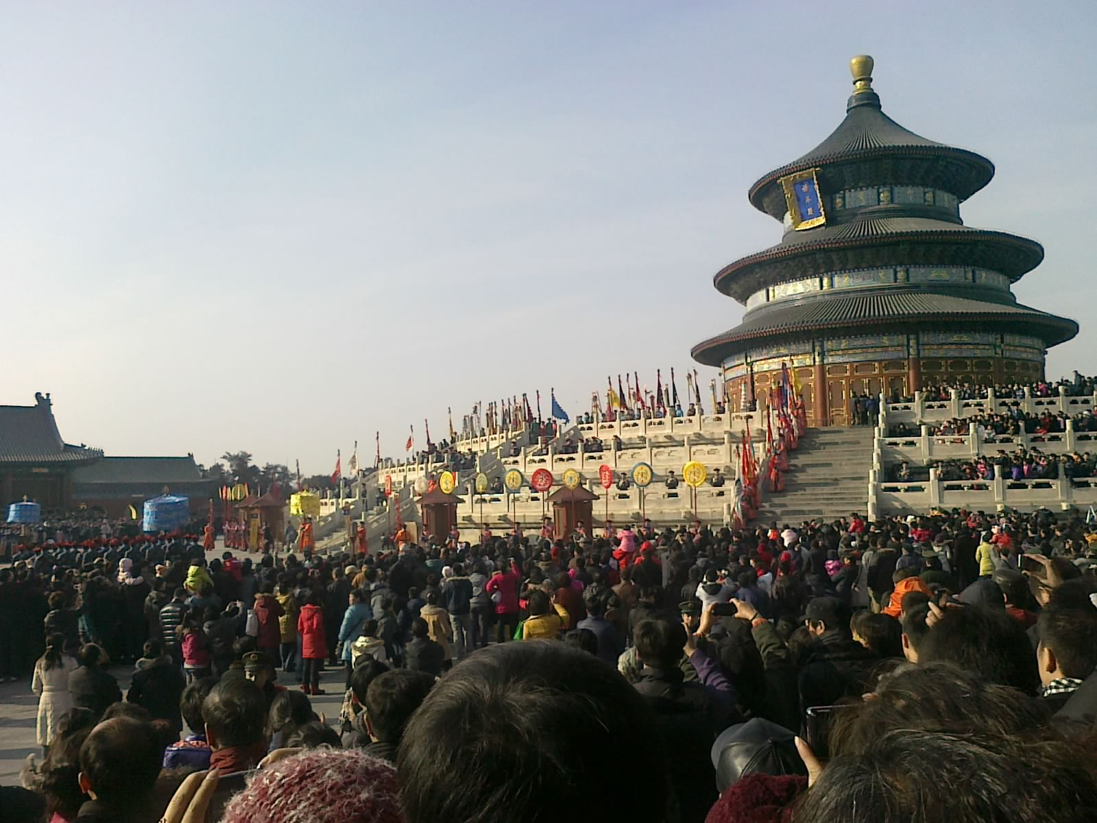 天坛祭天（2011-2 拍攝）